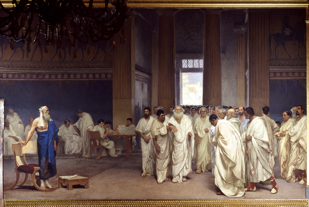 Чезаре Маккари. Аппий Клавдий Цек в сенате. Фреска. 1881-1888. Палаццо Мадама (Рим)